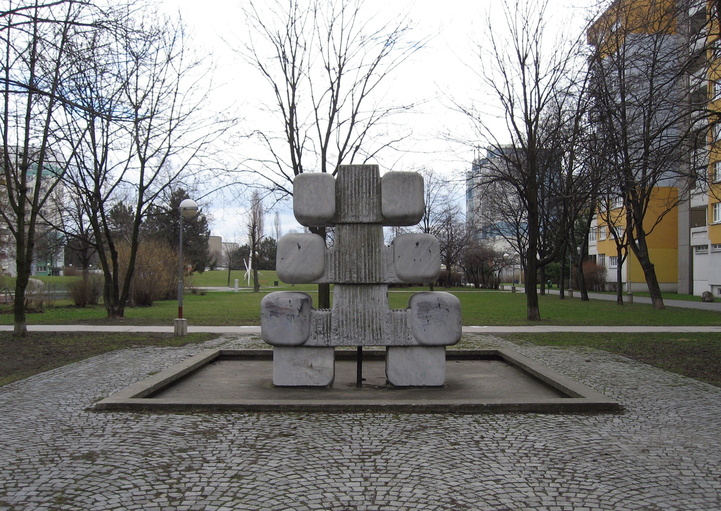 Wien, Trabrenngründe, Brunnen